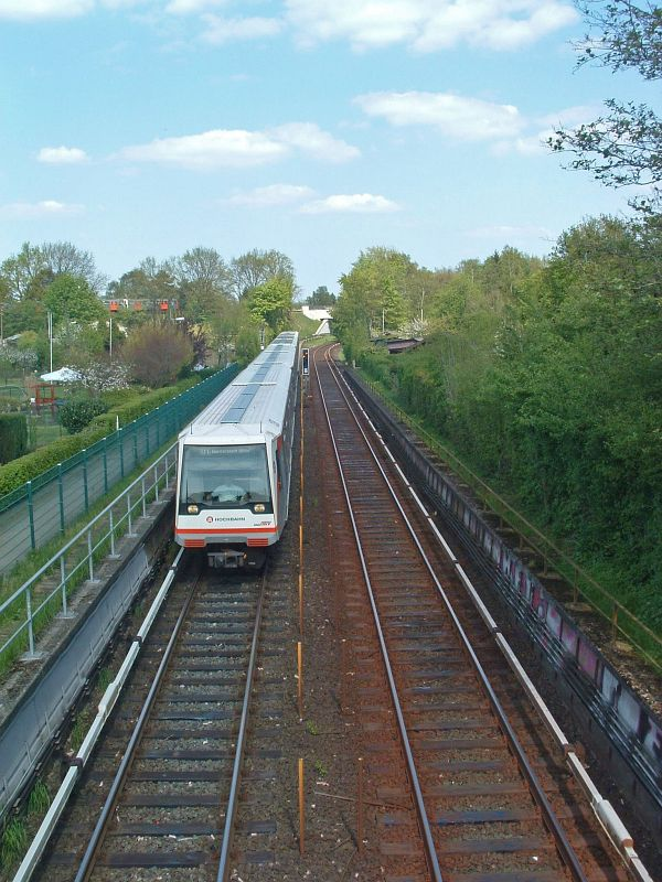 U-Bahn-Trasse in Hamburg-Barmbek-Nord (Linie U1 zwischen Wandsbek-Gartenstadt und Alter Teichweg)